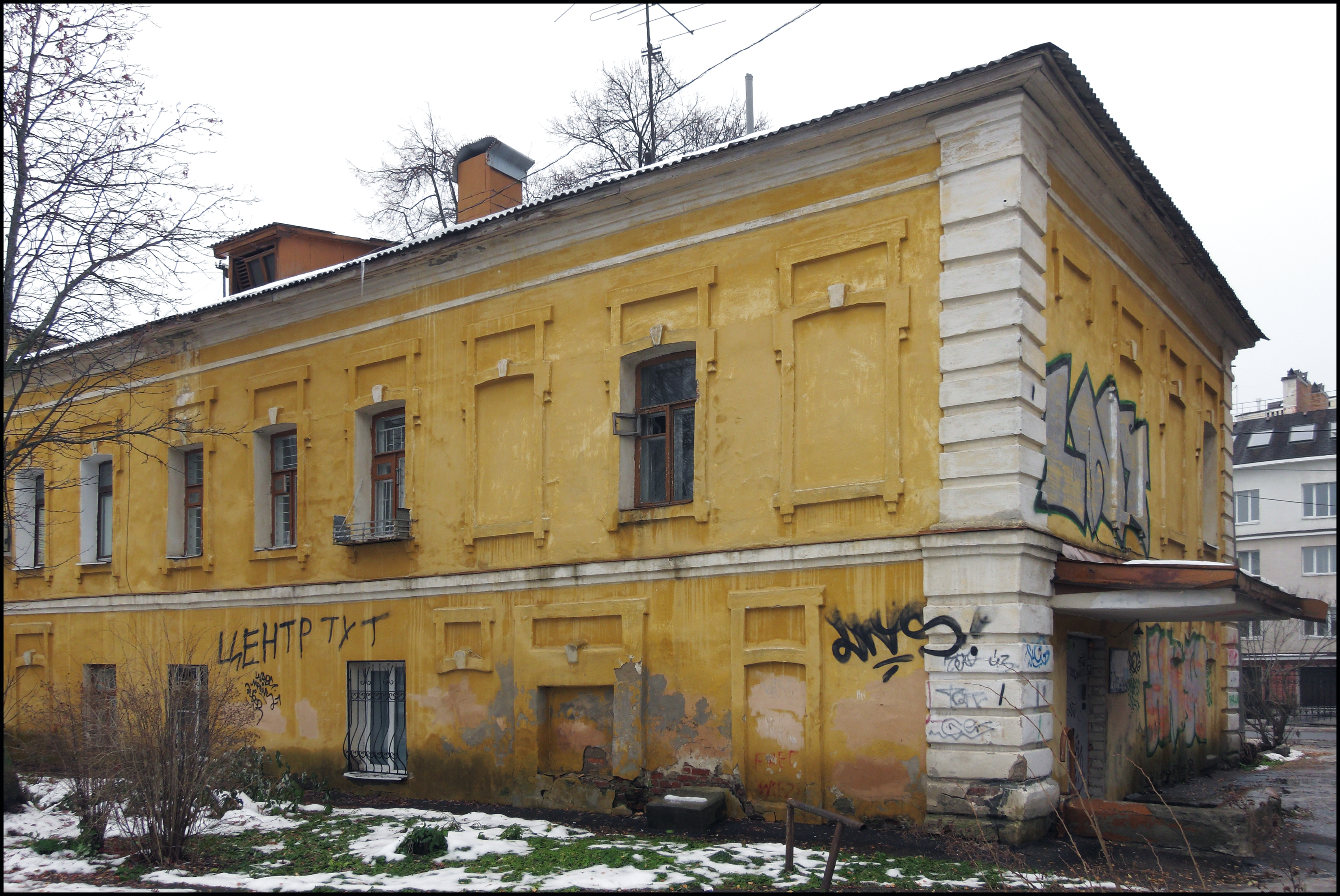 Фабрики Качурова (Ярославская область, Ярославль, Волкова улица, 6)